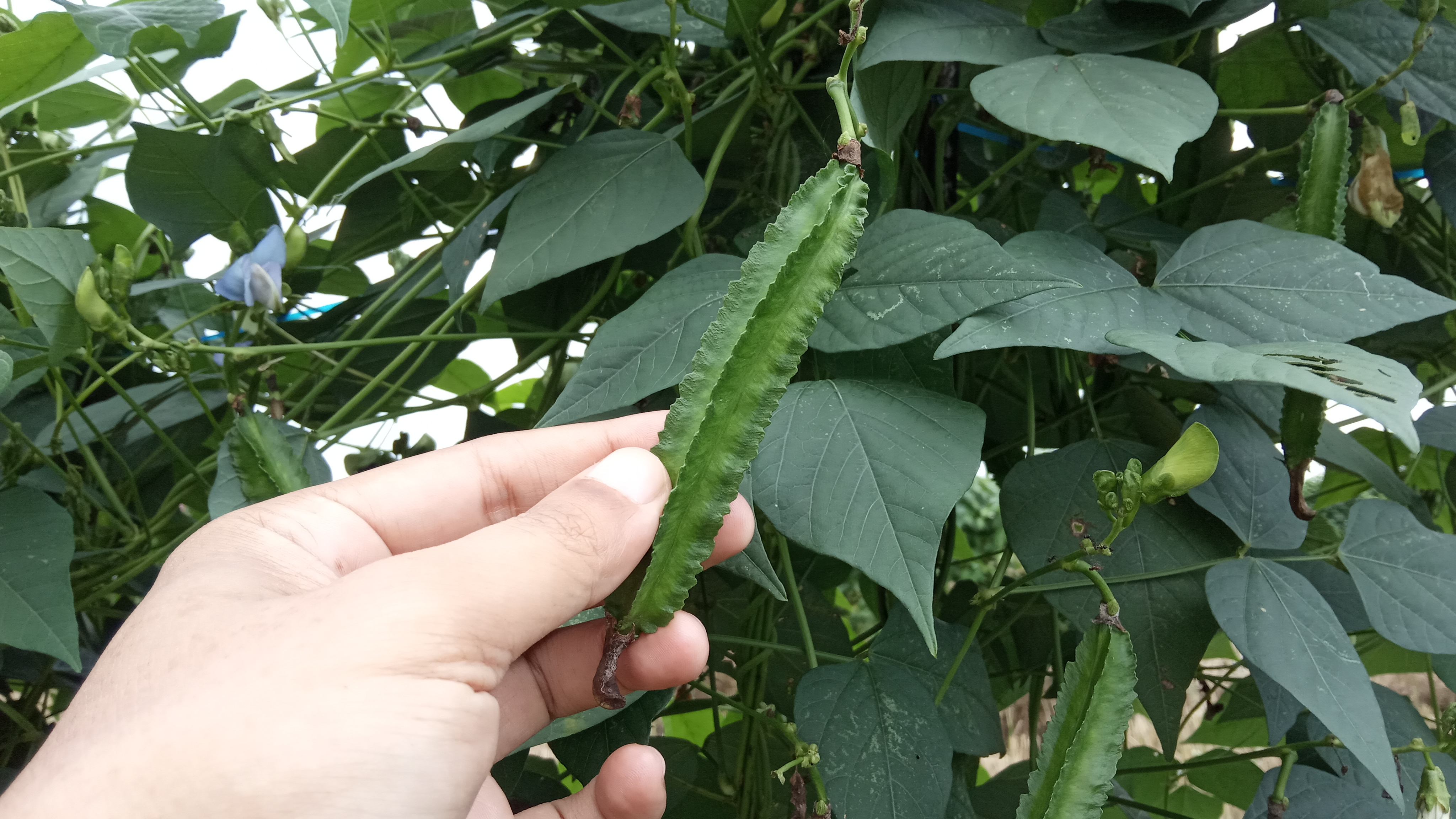 Kecipir/Kacang Botol